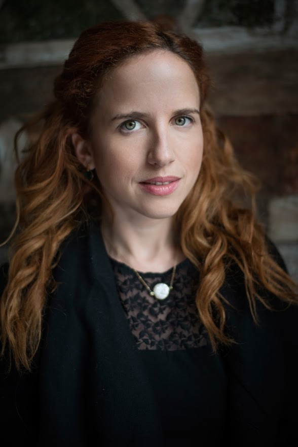 חברת הכנסת סתיו שפיר